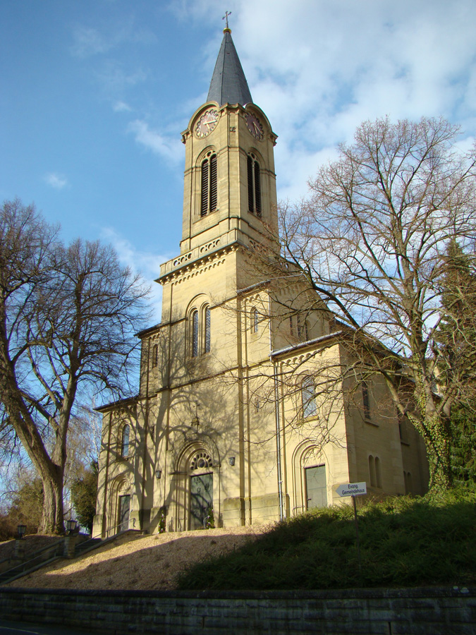 Historisches Gebäude Kaiserstr. 10 (evang. Kirche) in Eppingen